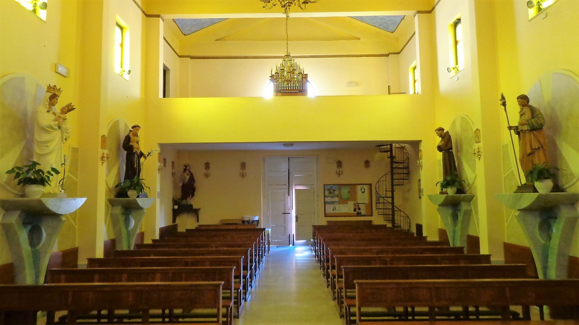 Controfacciata